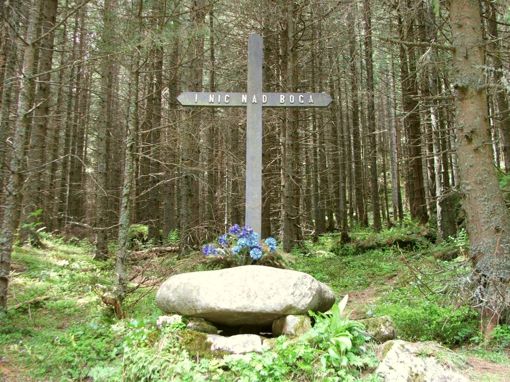 Krzyż Pola (Dolina Kościeliska)